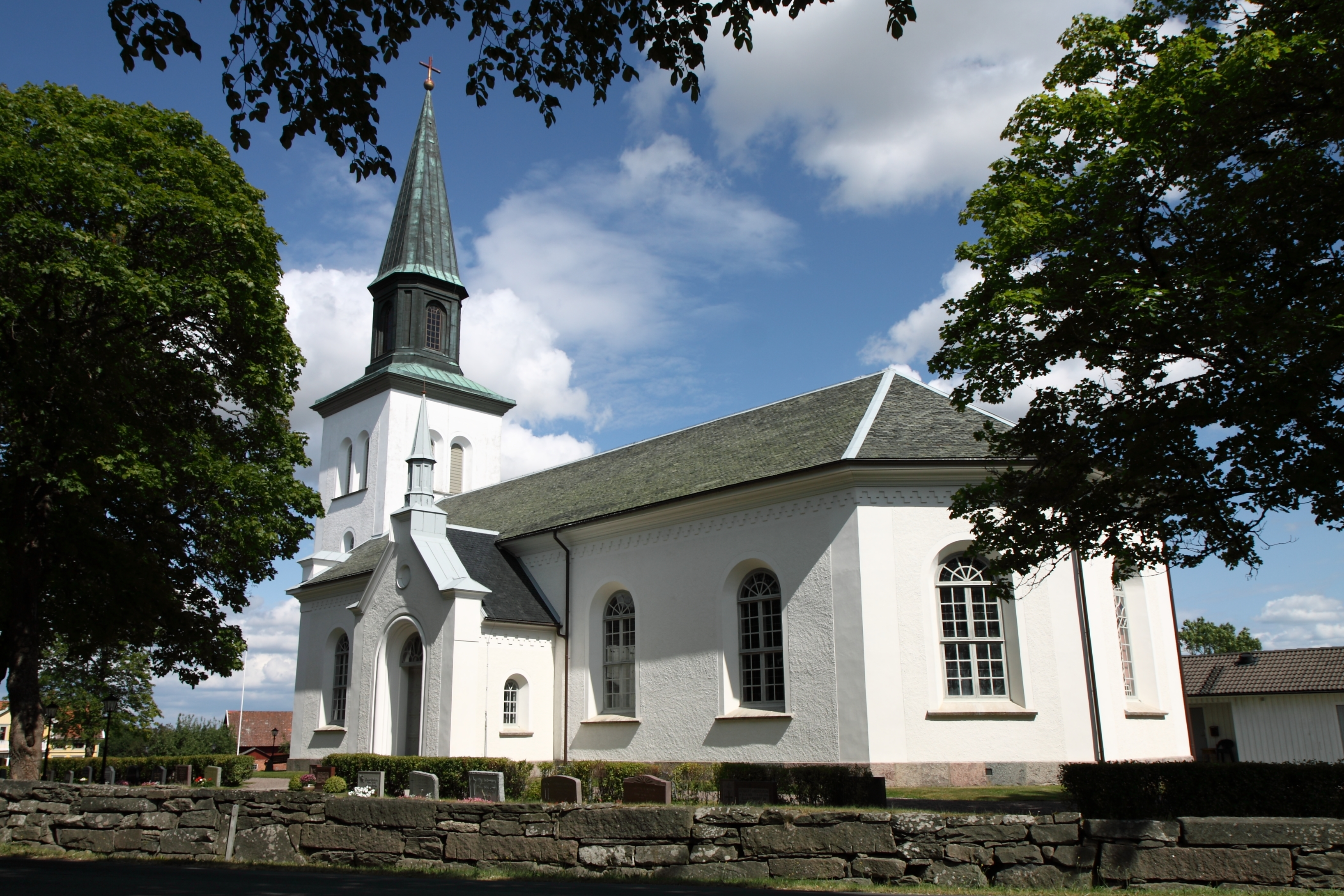 Varola kyrka.